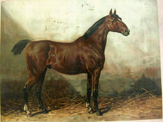 Holsteiner